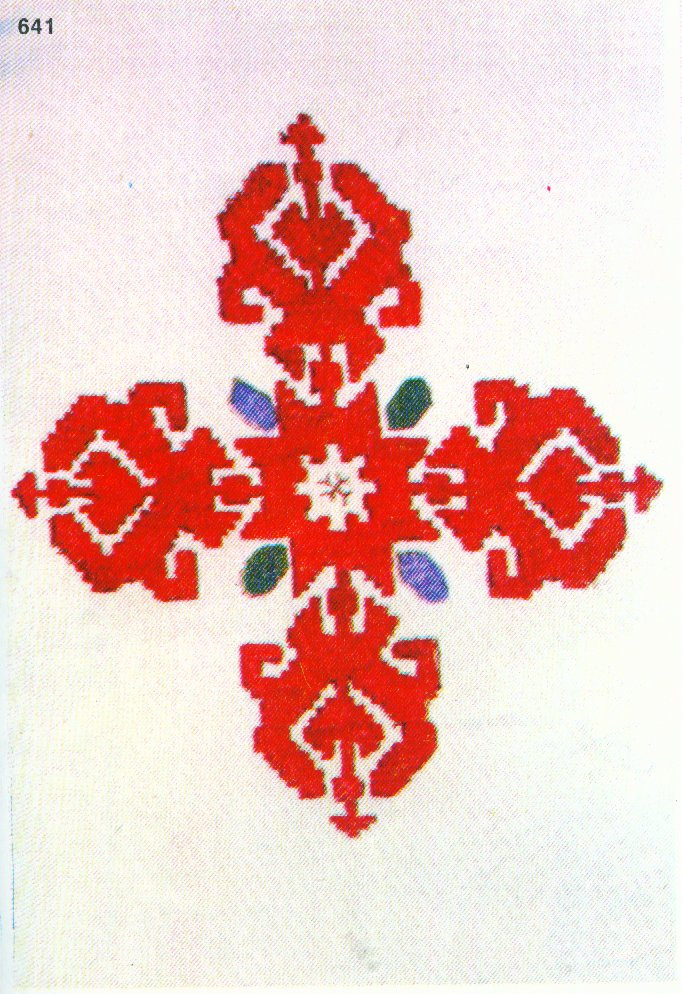 641. Кръст, везан с вълнени конци върху ръкава на риза (носия из Софийските села). Четирикрилен; крилата му се разклоняват навън и излизат от един вътрешен със звезда в средата си и в нея малко кръстче кръст, крилата на който се раздвояват; от между ъглите му излиза по един лъч; черни контури. Копиран от оригинала из сбирката на Ив. Енчев- Видю през април 1914 г. (Т. 2, обр. 144.)